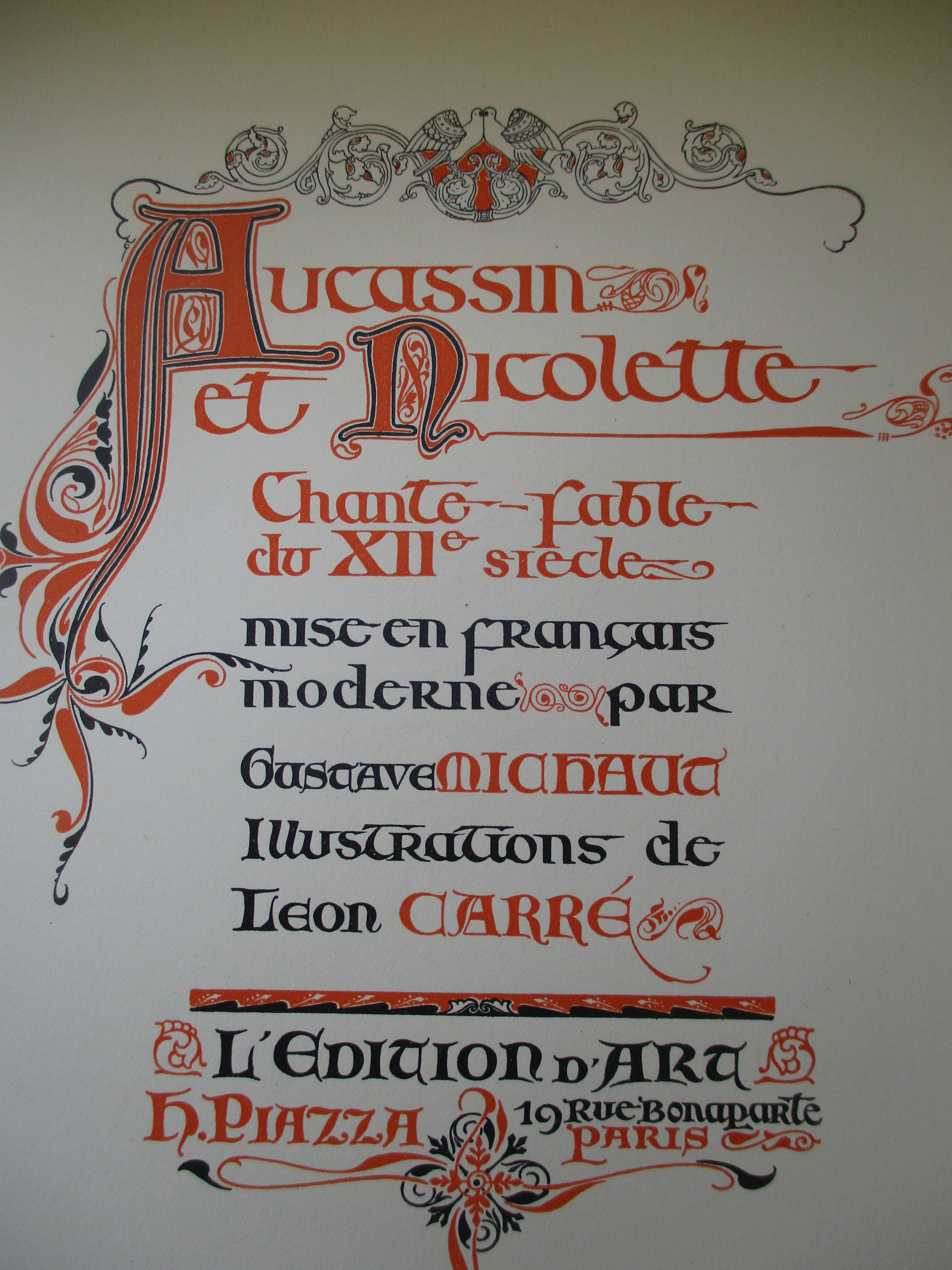 Aucassin et Nicolette, ouvrage édité par H. Piazza, imprimé par R. Coulouma, avec des illustrations en couleur pleine page de Léon Carré et titres, bandeaux, lettres ornées, culs de lampe en noir et rouge dessinés par Charles Navetto.